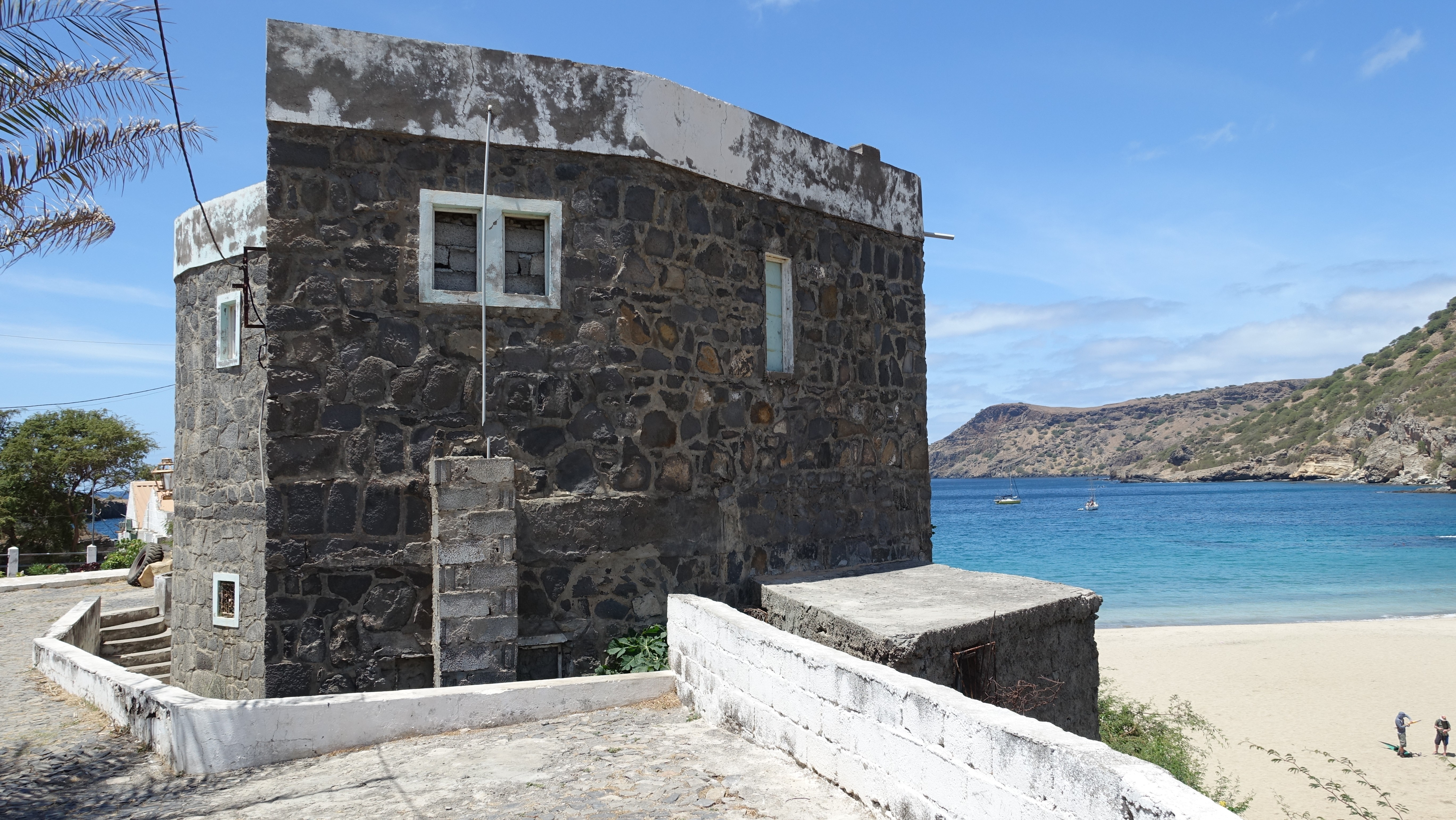 Tarrafal - Steinhaus über der Hafenbucht